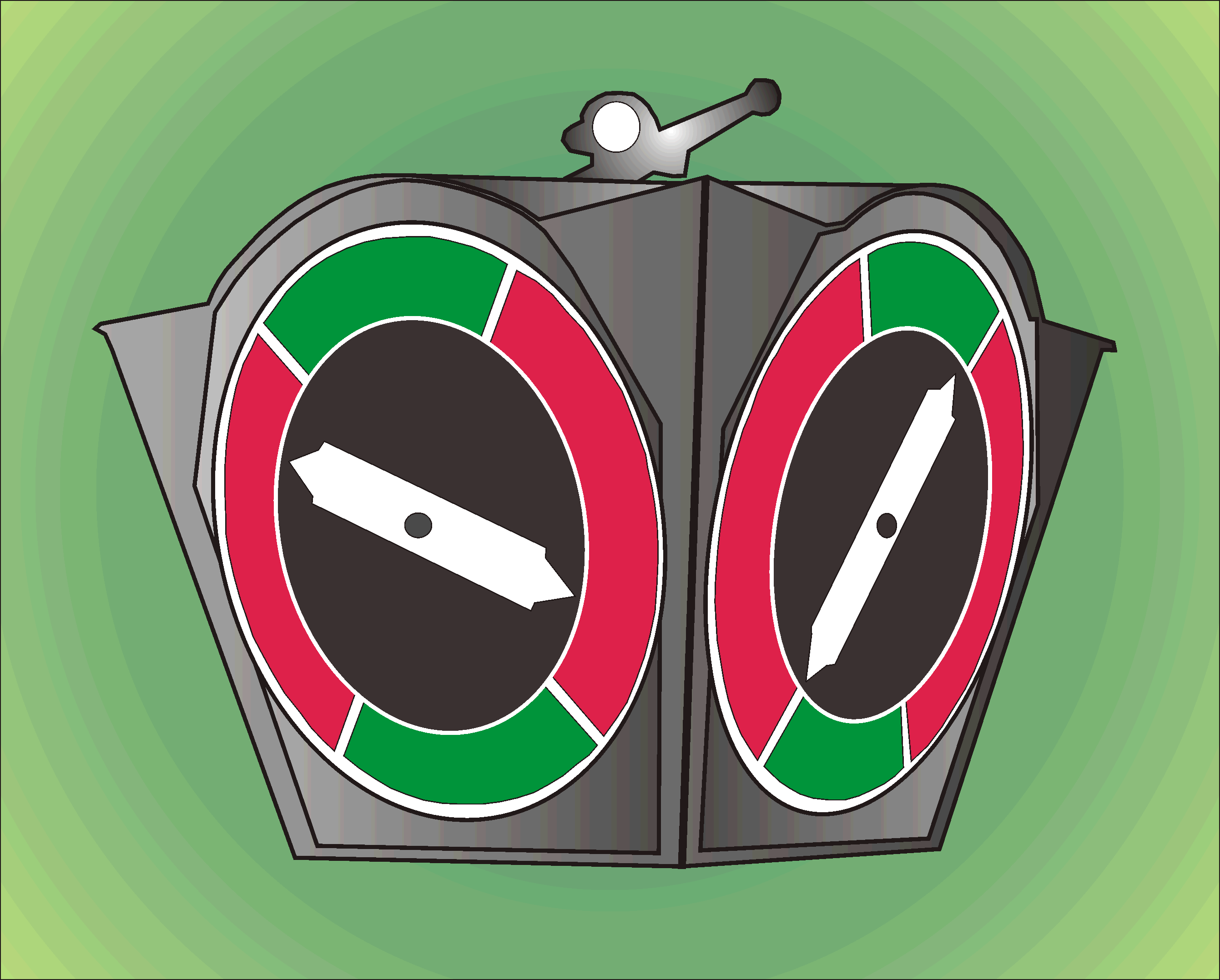 Heuerampel, schematische Darstellung - selbst erstellt 9/2005 - GNU-FDL